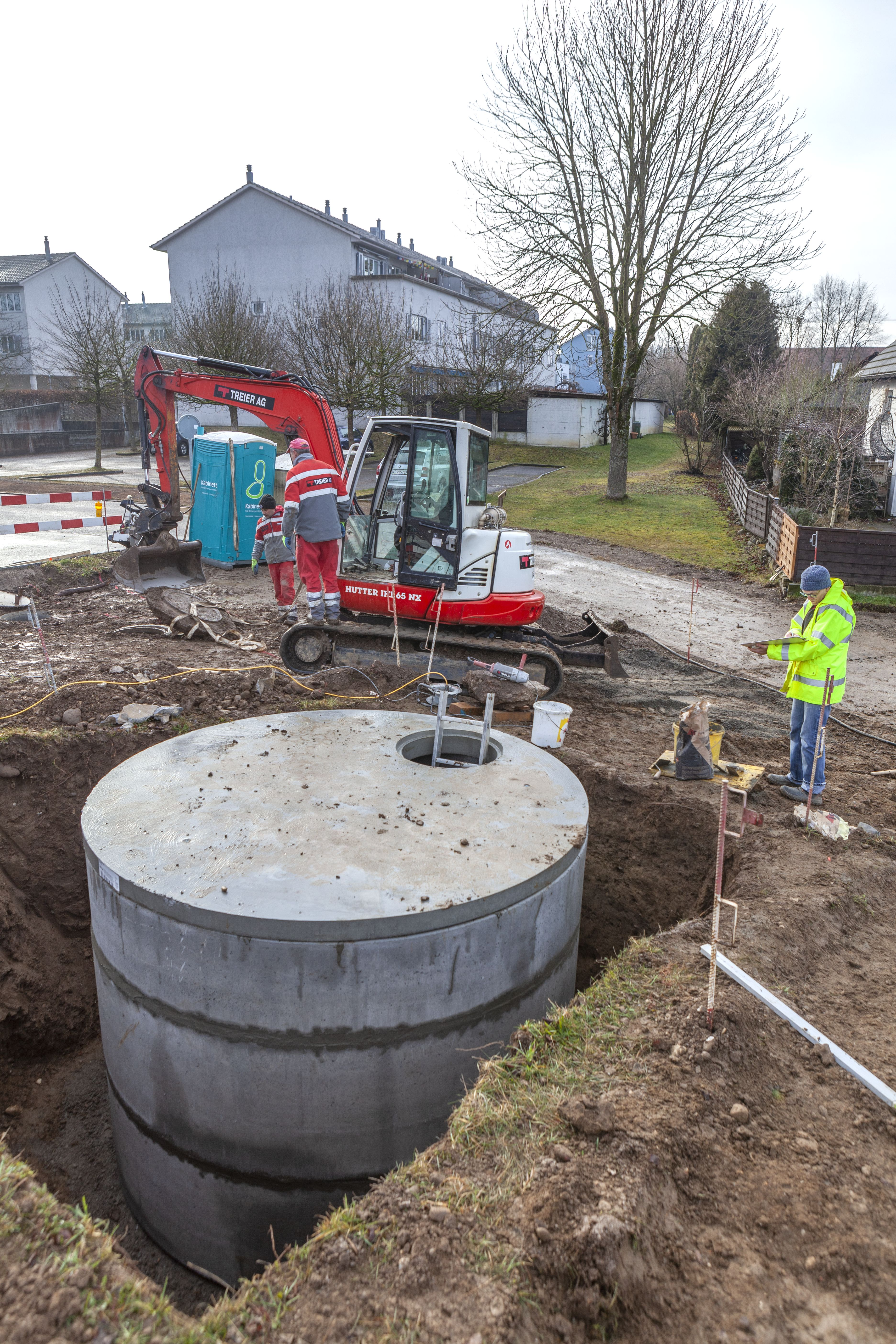 Arbeitsfoto der Kantonsarchäologie Aargau mit Grabungsleiter Jürgen Trumm Objekt: Schacht der wasserführenden römischen/mittelalterlichen Wasserleitung von Vindonissa Ort: Hausen, Feuerwehrmagazin Datierung: 1. Jh. n. Chr. (Wasserleitung) / 2019 (moderner Schacht) Aufnahmedatum: 20.2.2019 Anlass der Grabung: Neubau einer Einstellhalle unmittelbar über der Wasserleitung Beschreibung: Mit dem Aufsetzen eines modernen Schachtes musste die Zugänglichkeit des alten Schachtes 16 weiter gewährleistet werden. Ein dreiteiliger Betonschacht (Aussendurchmesser ca. 2,2m) mit verschliessbarem Metalldeckel wurde aufgesetzt, ohne das alte Bauwerk unmittelbar zu tangieren. Zudem wurde von Osten, von einer bestehenden Sickeranlage her, ein PP-Rohr aufgelegt, um das Dachwasser der umliegenden Neubauten nun mittels Überlauf in die alte Wasserleitung einzuspeisen.